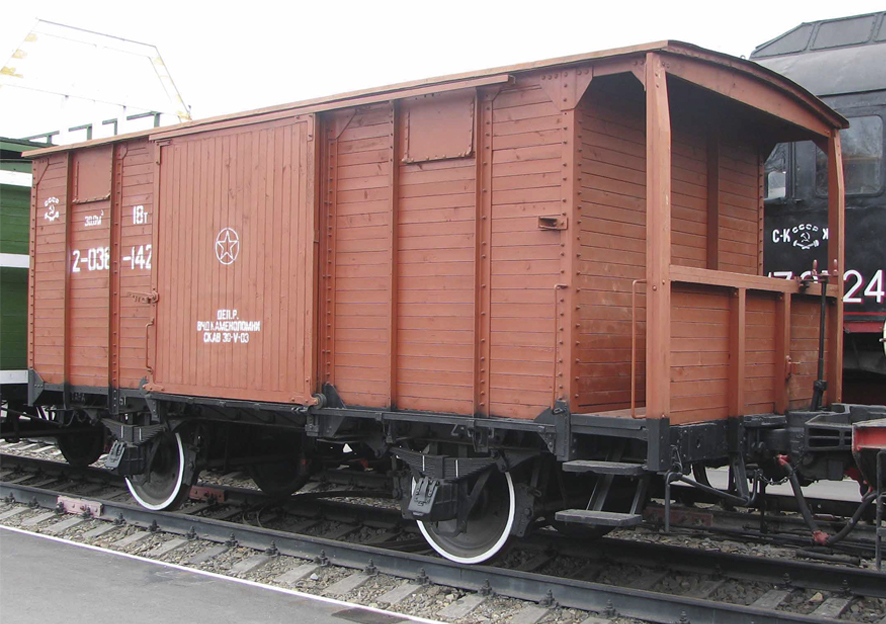 Вагон построен в 1920-х годах